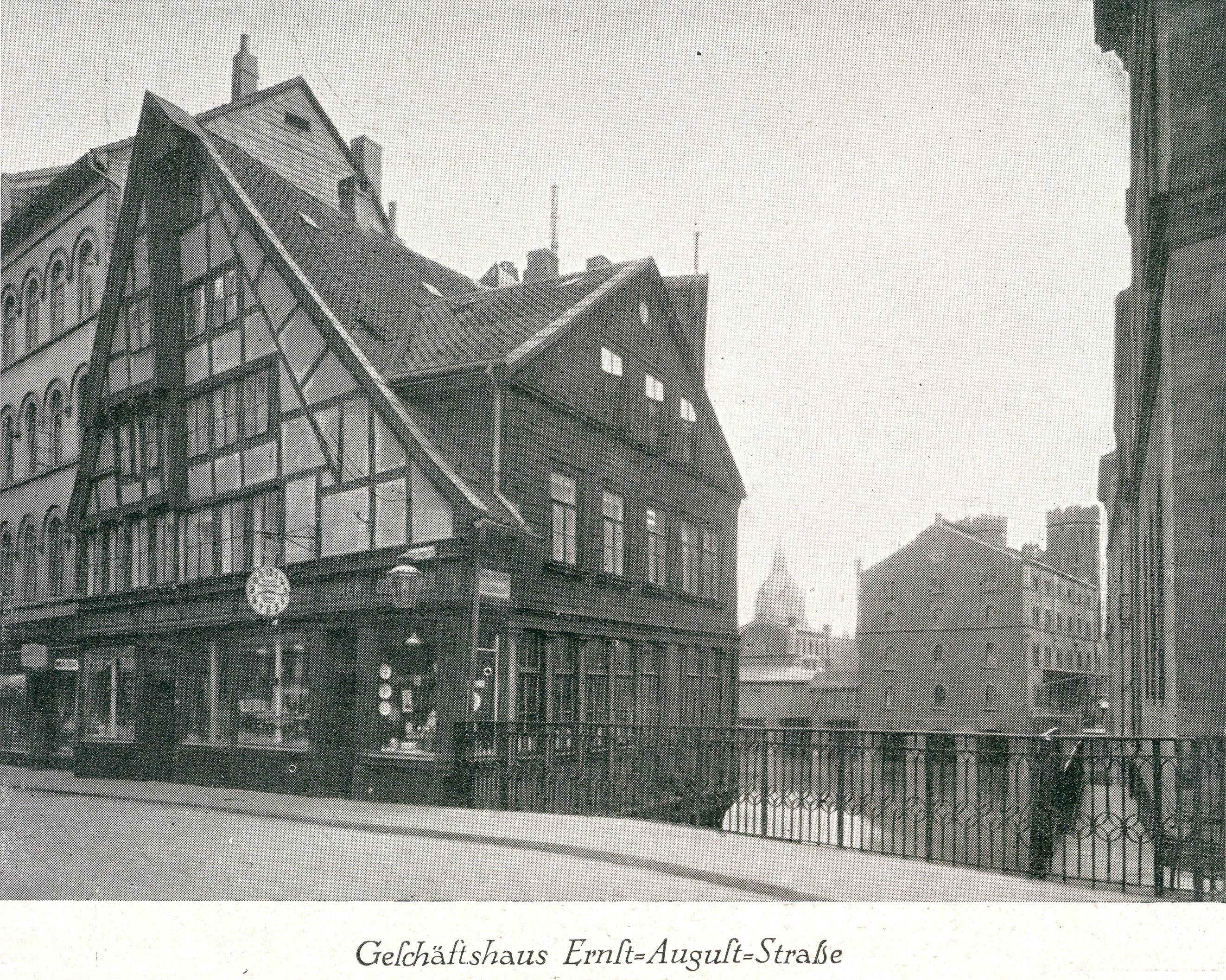 Blick auf das mutmaßlich Ende des 16. Jahrhunderts auf der Leineinsel Klein-Venedig in Hannover als Fachwerkhaus errichtete und ehemals denkmalgeschützte Geschäftshaus Ernst-August-Straße 8 (gefolgt vom Gebäude mit der Hausnummer 9), in dem zum Zeitpunkt der um 1920 getätigten Aufnahme die Uhren- und Goldwarenhandlung des Hofuhrmachers August Speckmann seinen Sitz hatte. Die seltene Fotografie, hier als punktgerasterter Druck, gewährt einen Blick von der Brücke an der Ecke Calenberger Straße entlang dem Königlichen Regierungsgebäude (Dicasteriengebäude, heute Niedersächsisches Umweltministerium) über die Leine und zur Brückmühle. Ganz im Hintergrund ist bereits die Kuppel des 1913 eingeweihten Neuen Rathauses zu erkennen. Nach den Zerstörungen durch die Luftangriffe auf Hannover im Zweiten Weltkrieg wurde der Brückmühlenarm der Leine zugeschüttet und nach Plänen von Stadtbaudirektor Rudolf Hillebrecht für die Autogerechte Stadt hier das mehrspurige Leibnizufer über den Standort hinweggeführt ...